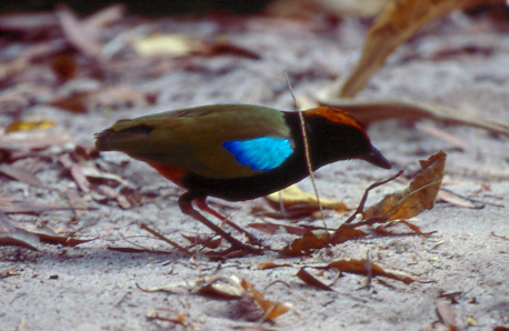 Rainbow Pita Pita Iris